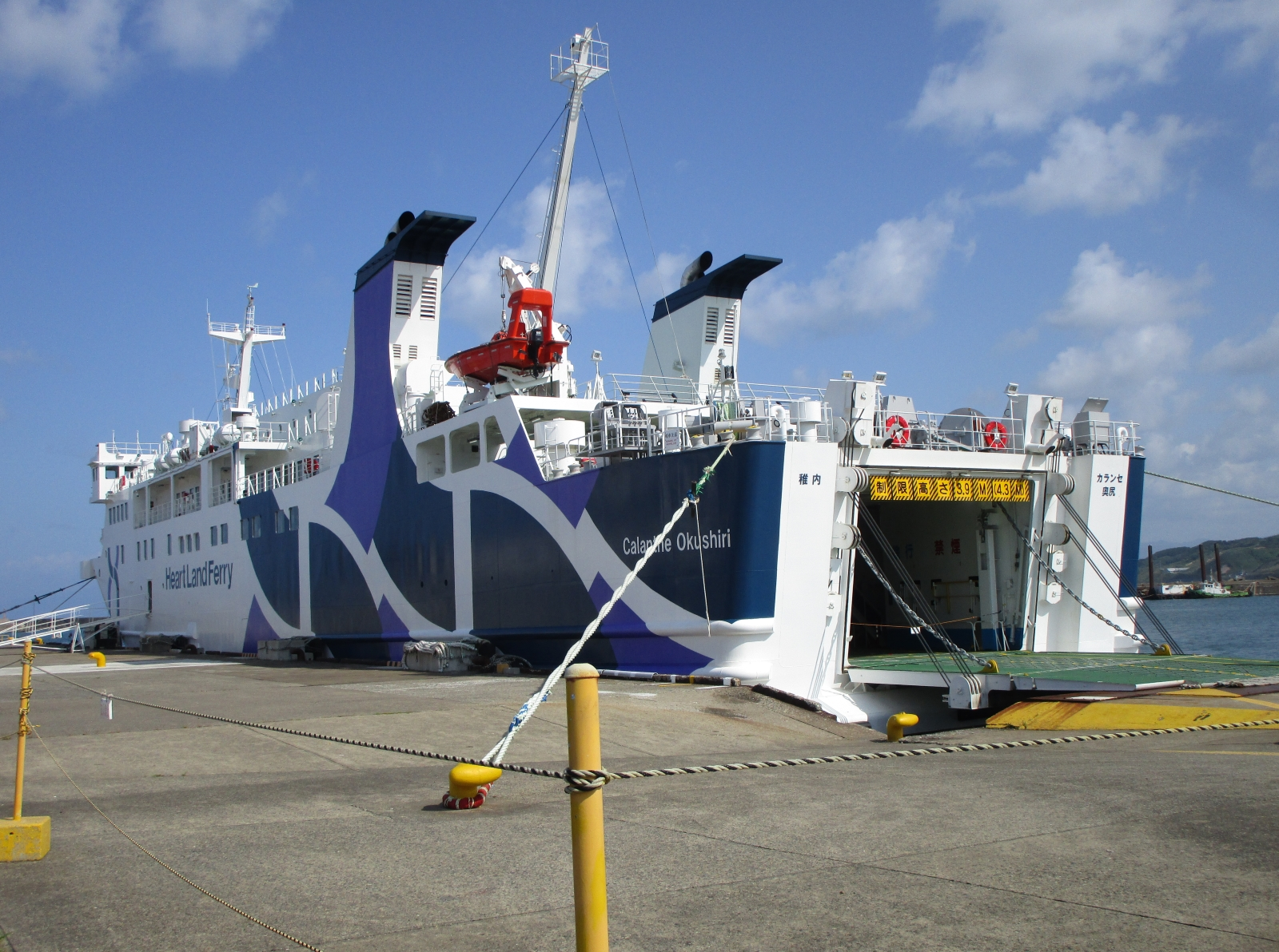 カランセ奥尻（江差港で撮影）